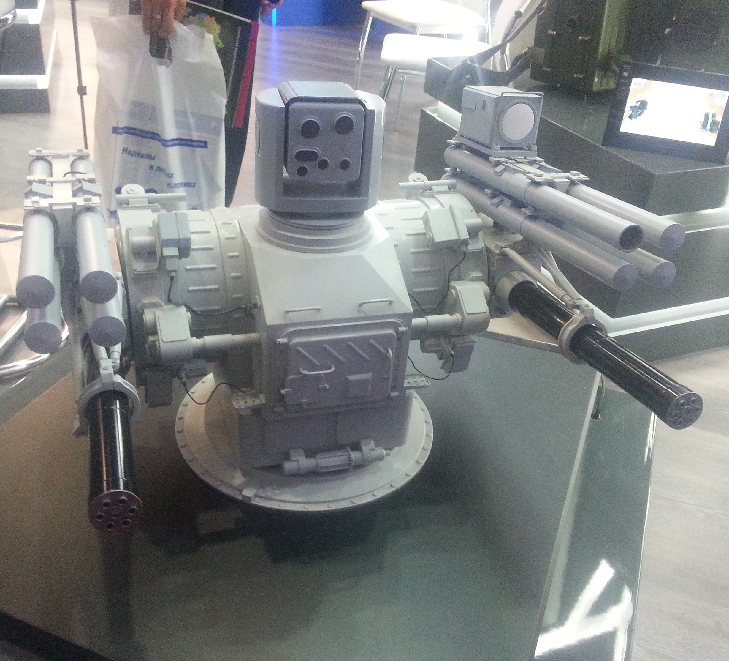 Модель ЗРАК Палаш с ракетами «Сосна»-РА на выставке «Армия 2016»